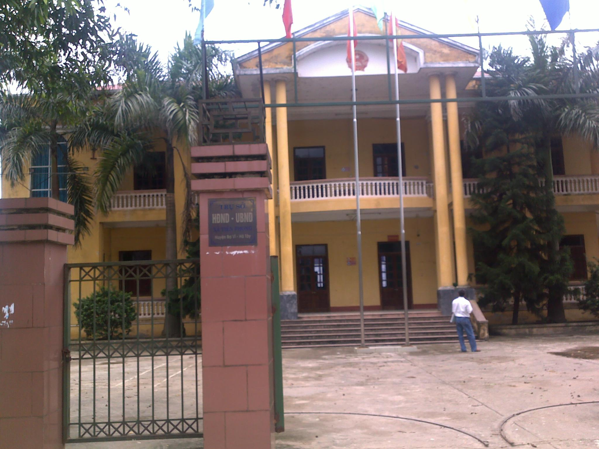 Trụ sở UBND xã Tiên Phong, Ba Vì, Hà Nội